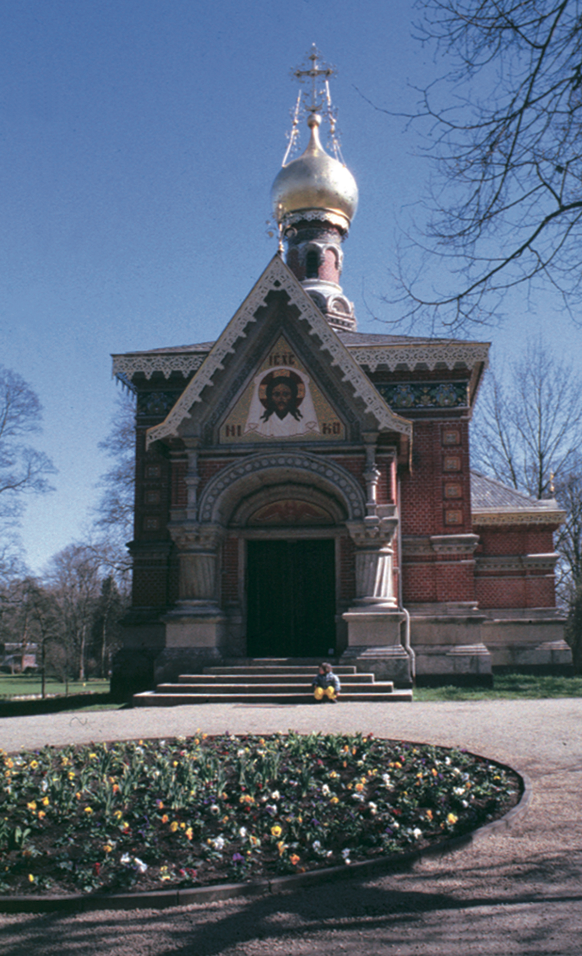 Russische Kapelle im Kurpark Bad Homburg / Russian Chapel, spa gardens Bad Homburg